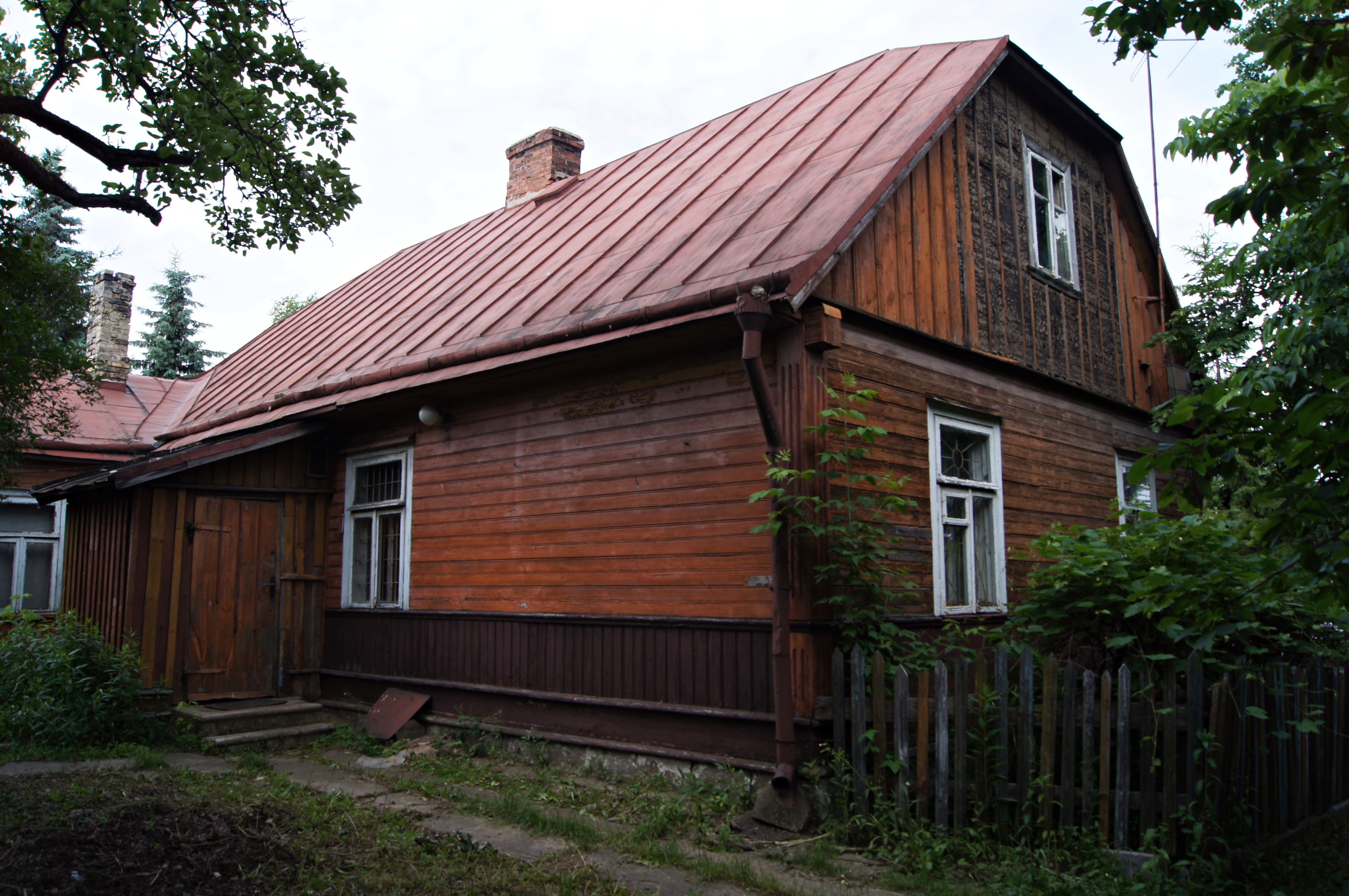 Dom Mariana Piekarskiego przy ulicy Podhorskiego 5 (dawniej Kolejowa 8/1) w Suwałkach.